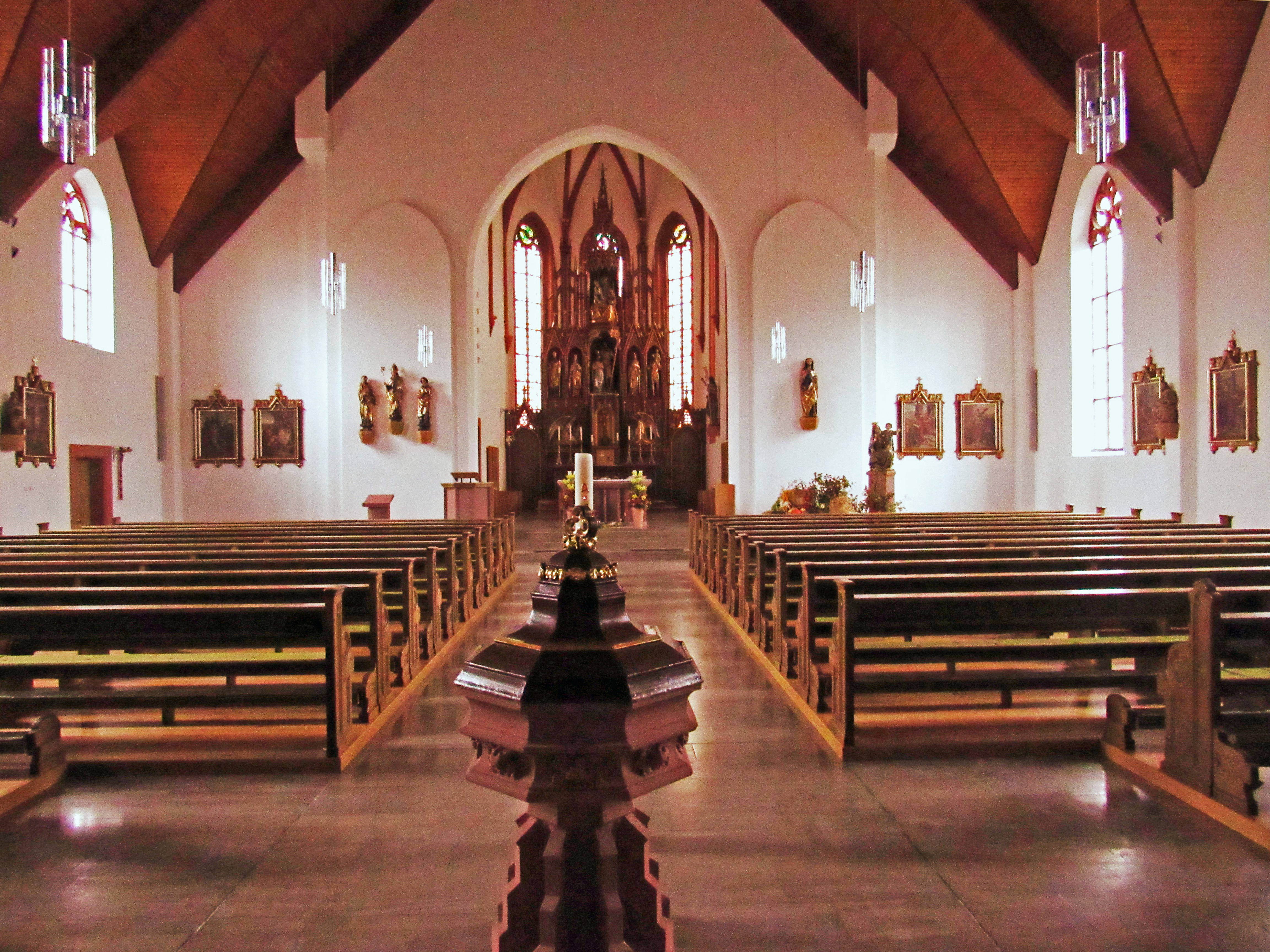 Inneres St. Johannes der Täufer